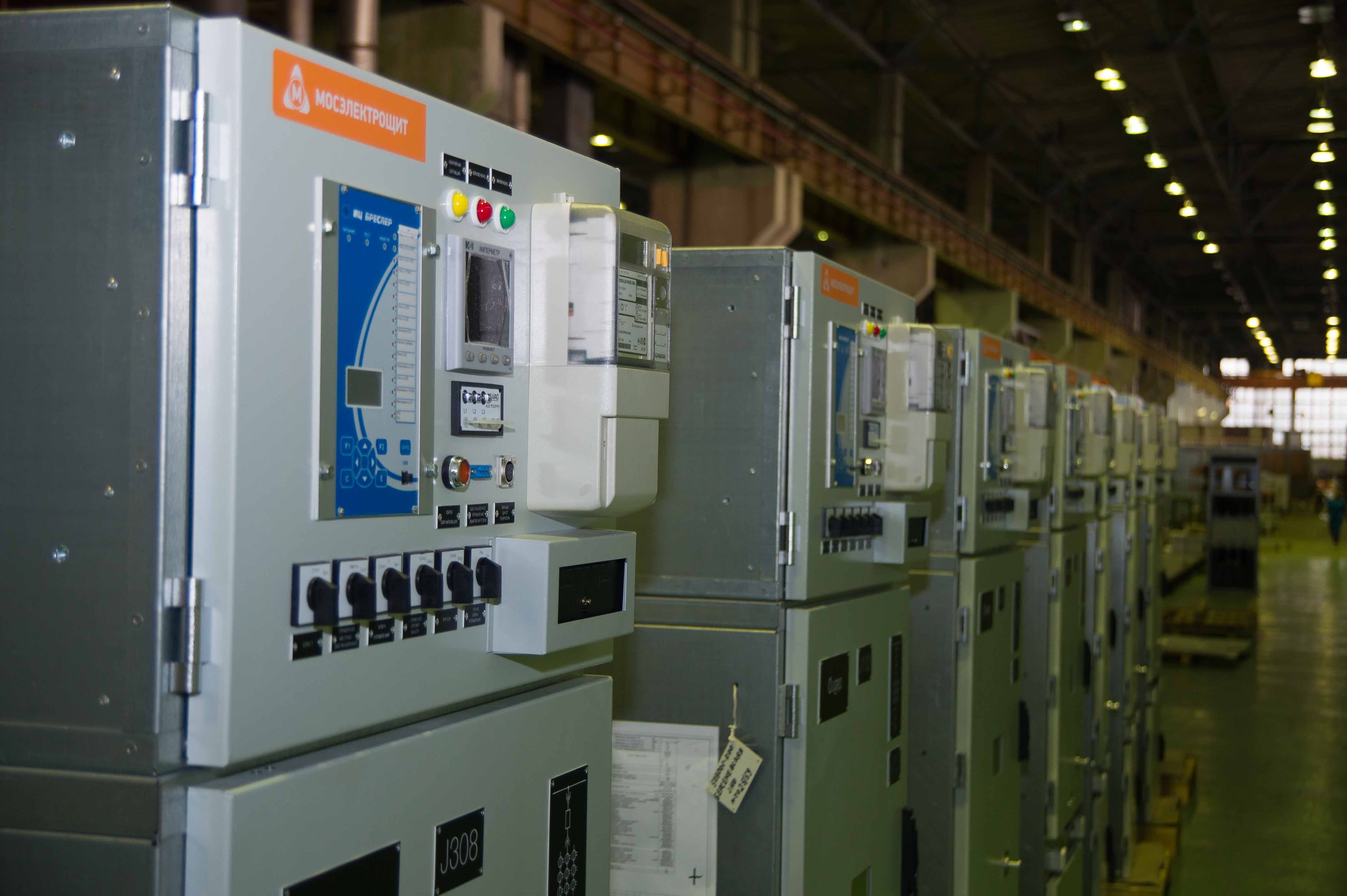 К-131 ПРОГРЕСС на 20 кВ